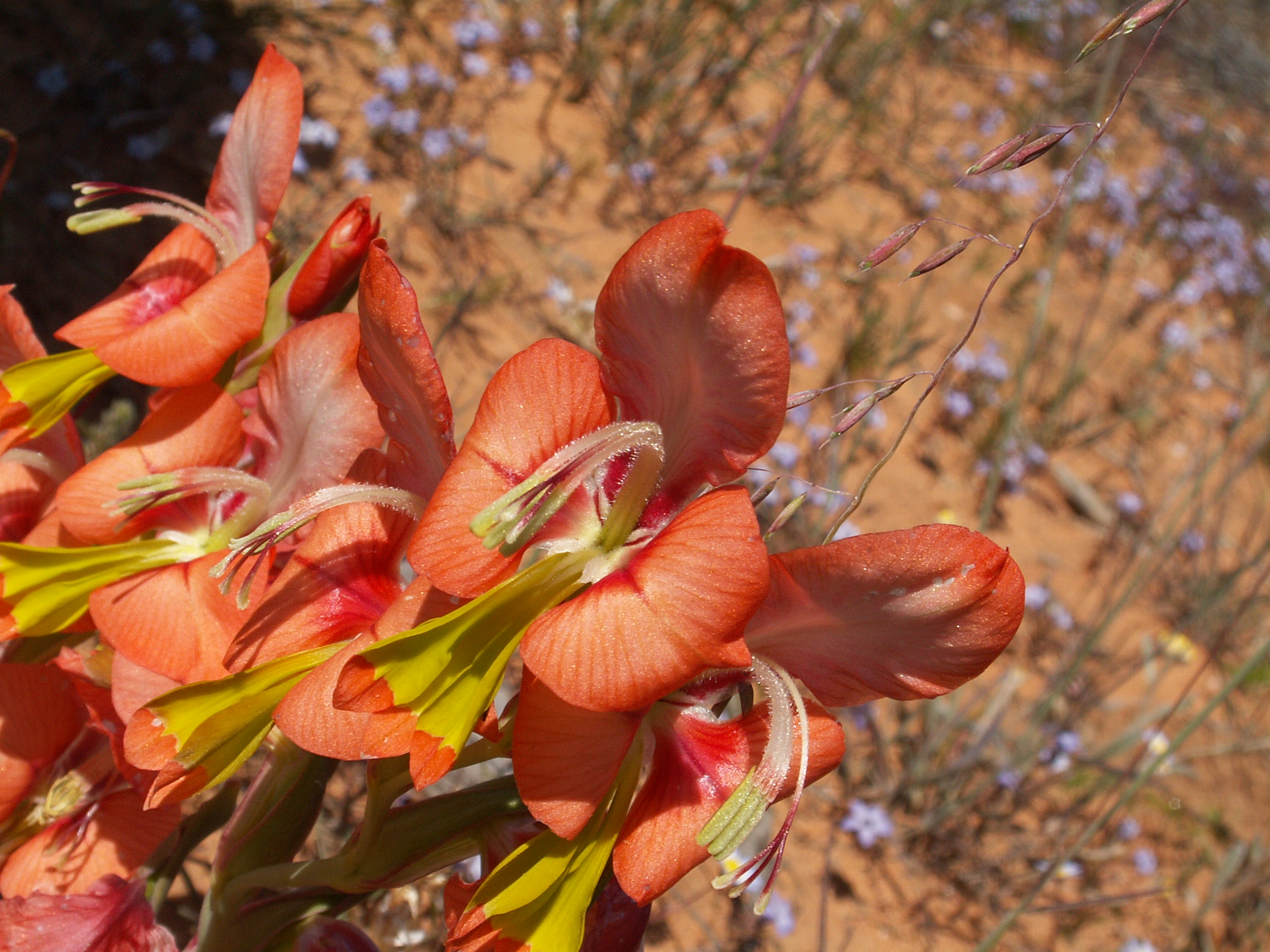 Siegwurz Gladiolus alatus L., Nahaufnahme, bei Clanwilliam, Gemeinde Cederberg, Distrikt Westküste, Südafrika